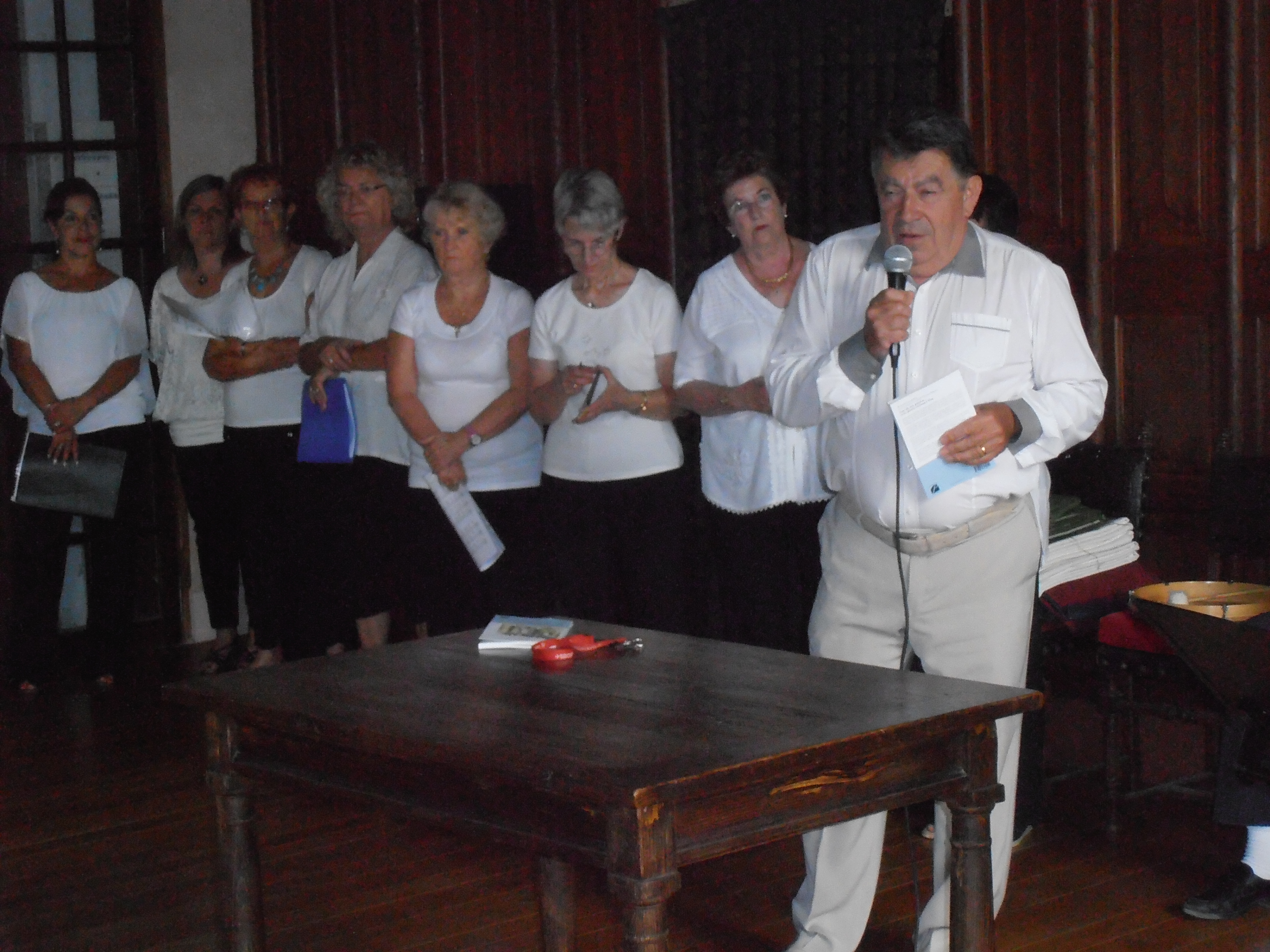 Var, Vins-sur-Caramy. A l’occasion du 30ème anniversaire de l’Association de sauvegarde et d’Animation Culturelle du Château de Vins, à laquelle la chorale de Vins a tenu à s’associer, le 4 juillet 2014, Bernard Lucquiaud présente son livre au public aux côtés de Jean Clotaire Bonnet « Une vie, une passion … et les pierres revivent à Vins (Mémoires) ». L’auteur agrémente l’histoire de Jean Clotaire Bonnet d’anecdotes contées avec humour, de descriptions précises, évocatrices et poétiques, et de récits historiques bien documentés sur le château et ses occupants. " Une vie, une passion ... et les pierres revivent à Vins" est avant tout un roman à l'adresse du "Grand public". Il poursuit trois objectifs : distraire (une belle histoire, un récit agréable...), instruire (données historiques et / ou techniques), inviter à la réflexion (problématique de la restauration et de la réutilisation, par exemple). Le dosage est très subtil, ni trop technique ni trop érudit, le récit intéressera la grande majorité des visiteurs du château et la population locale sensible à l'aventure de "son" château. L’auteur a parfaitement conjugué l'anecdote drôle et la vérité plus profonde, sans que cette dernière apparaisse trop compliquée, ardue, ou "réservée aux experts", mais sans les frustrer.